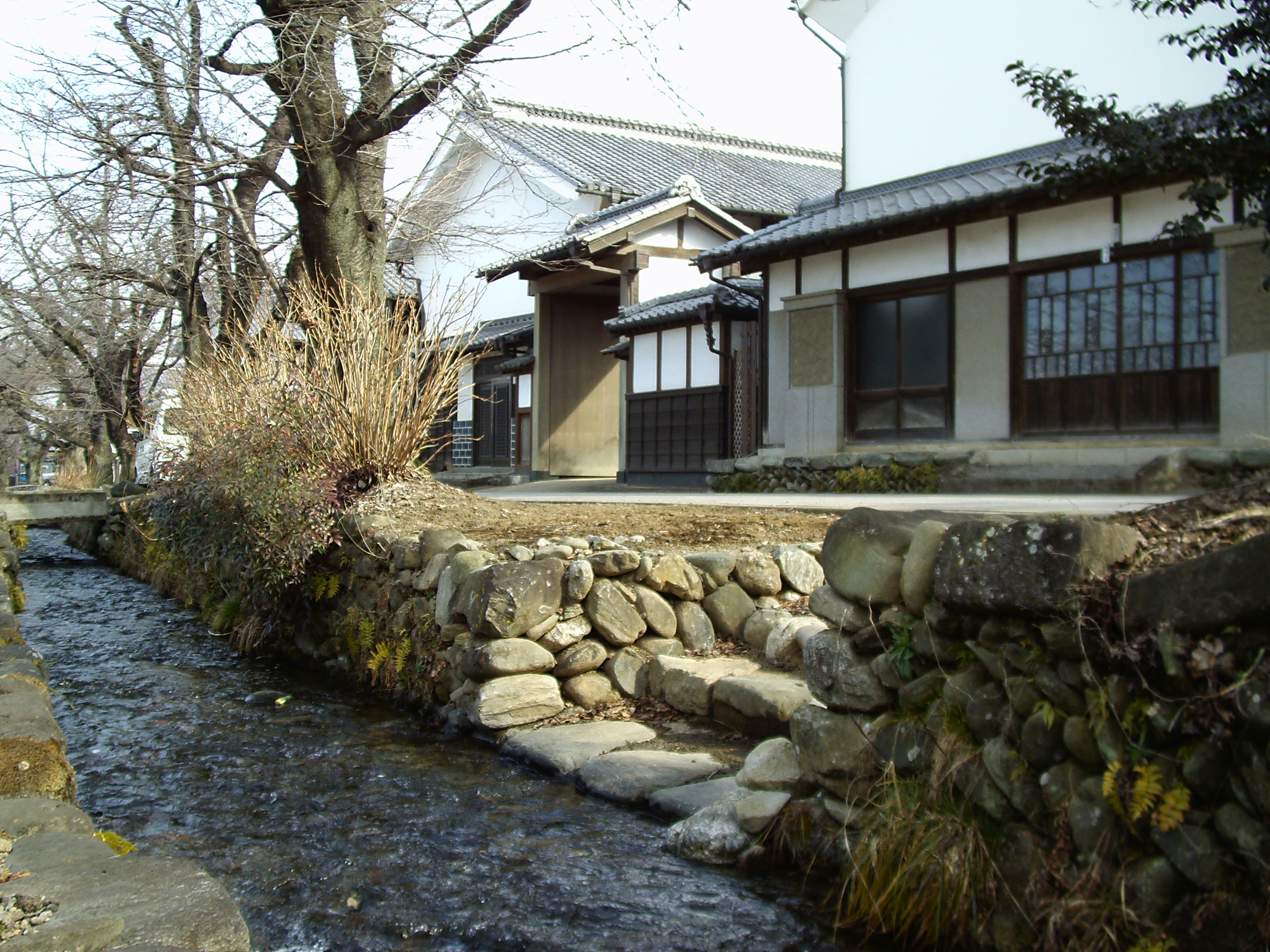 疏水百選・土木遺産・かんがい施設遺産・歴史的風致維持向上地区（歴史まちづくり法）・名水百選選定の雄川堰（群馬県甘楽町）、小幡藩の街並みの中を流れる